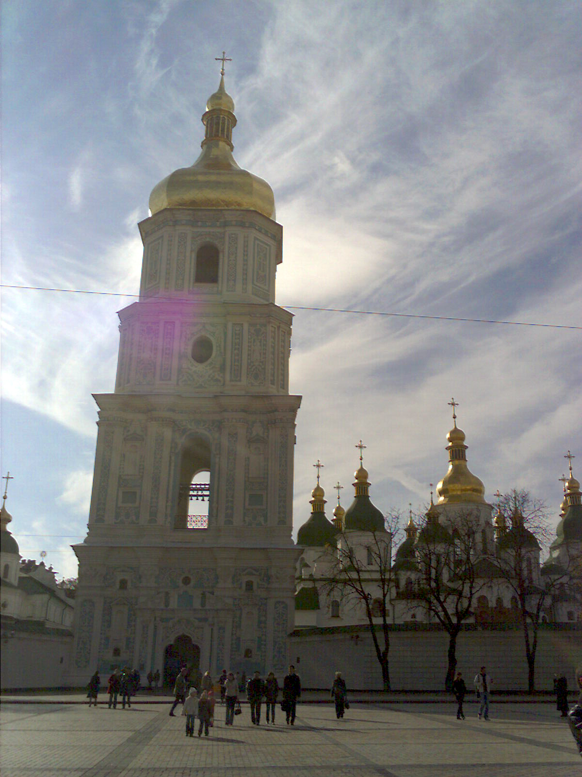 Дзвіниця та головний вхід